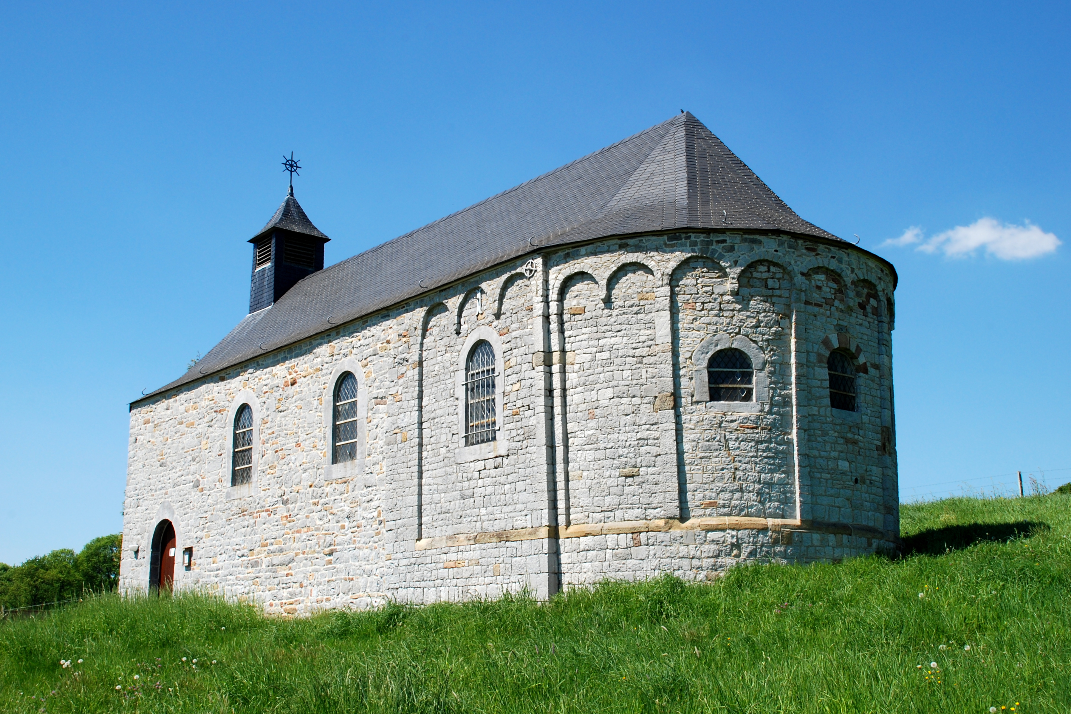 Belgique - Wallonie - Modave - Chapelle de Limet